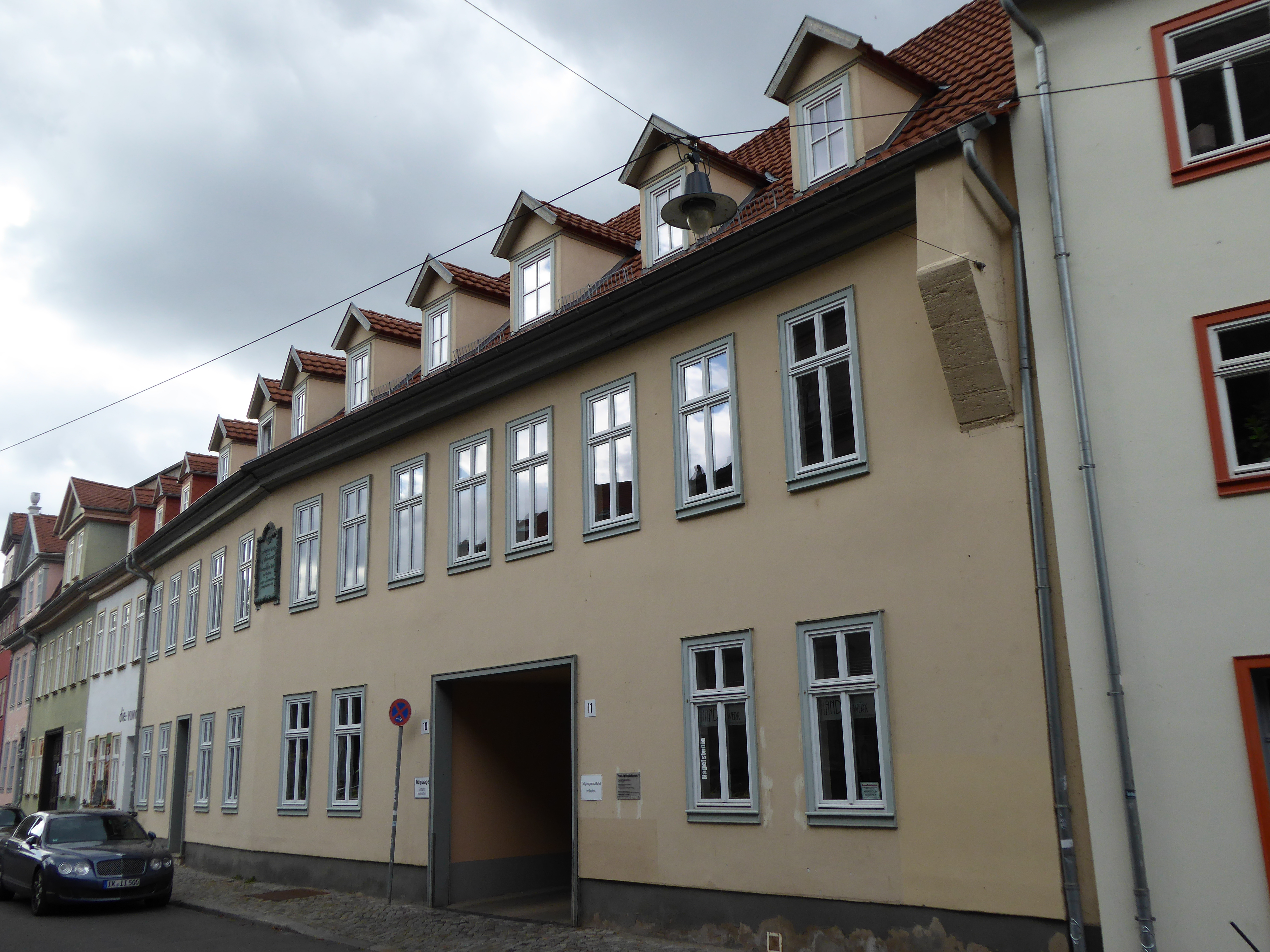 Denkmalgeschütztes Wohnhaus in der Predigerstraße 10 und 11 in Erfurt